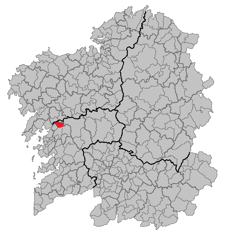 Mapa coa localización do concello de Valga.